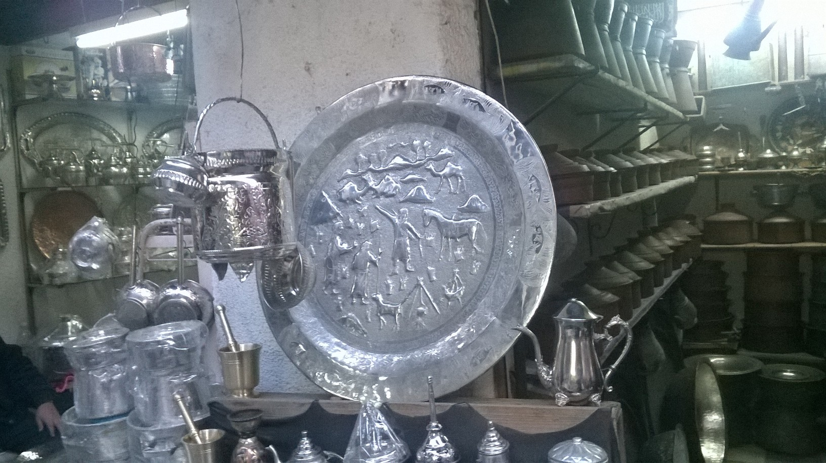 Souk du cuivre , la médina de Tunis